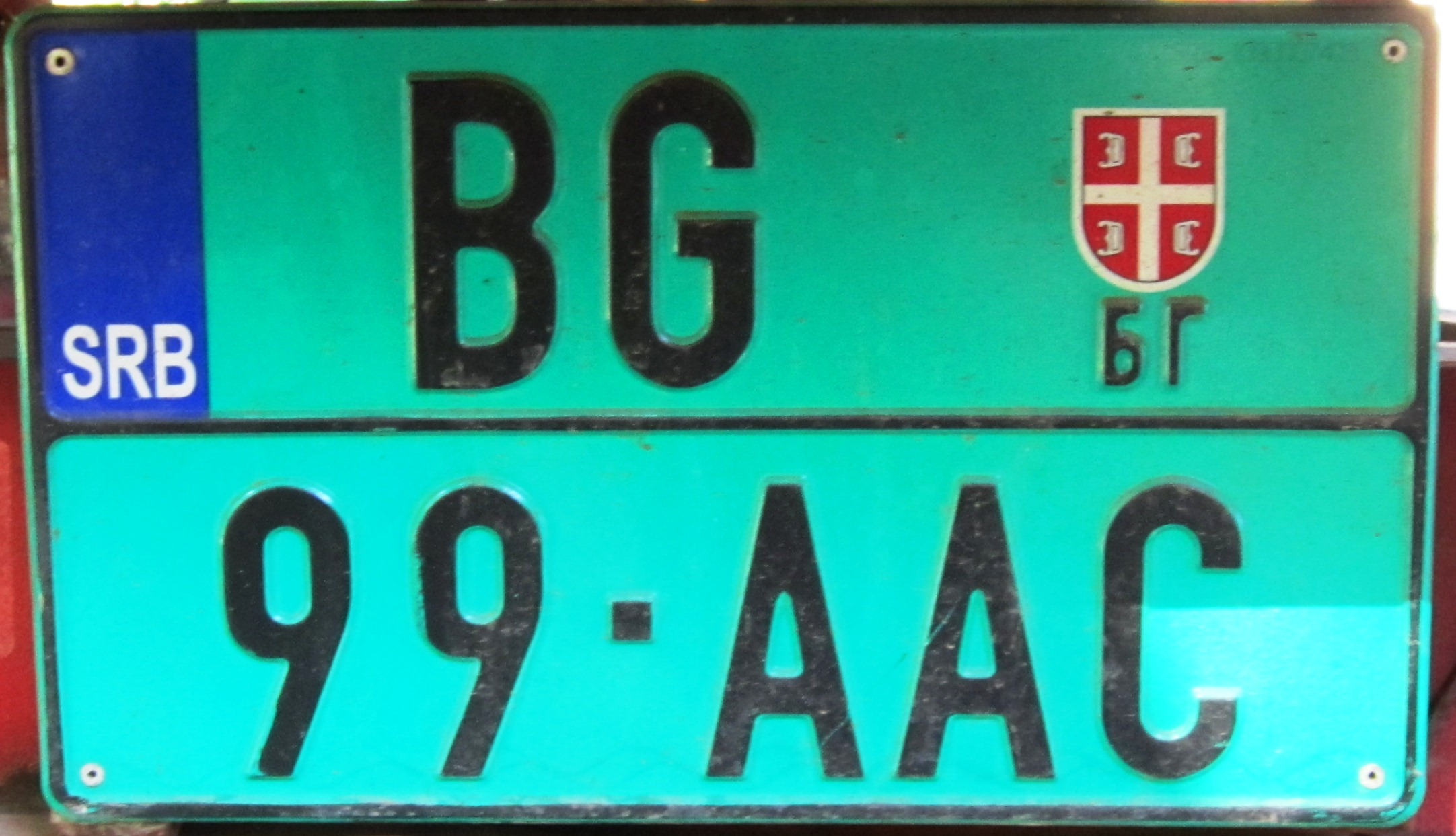 Servië landbouwvoertuig kenteken nieuw Belgrado